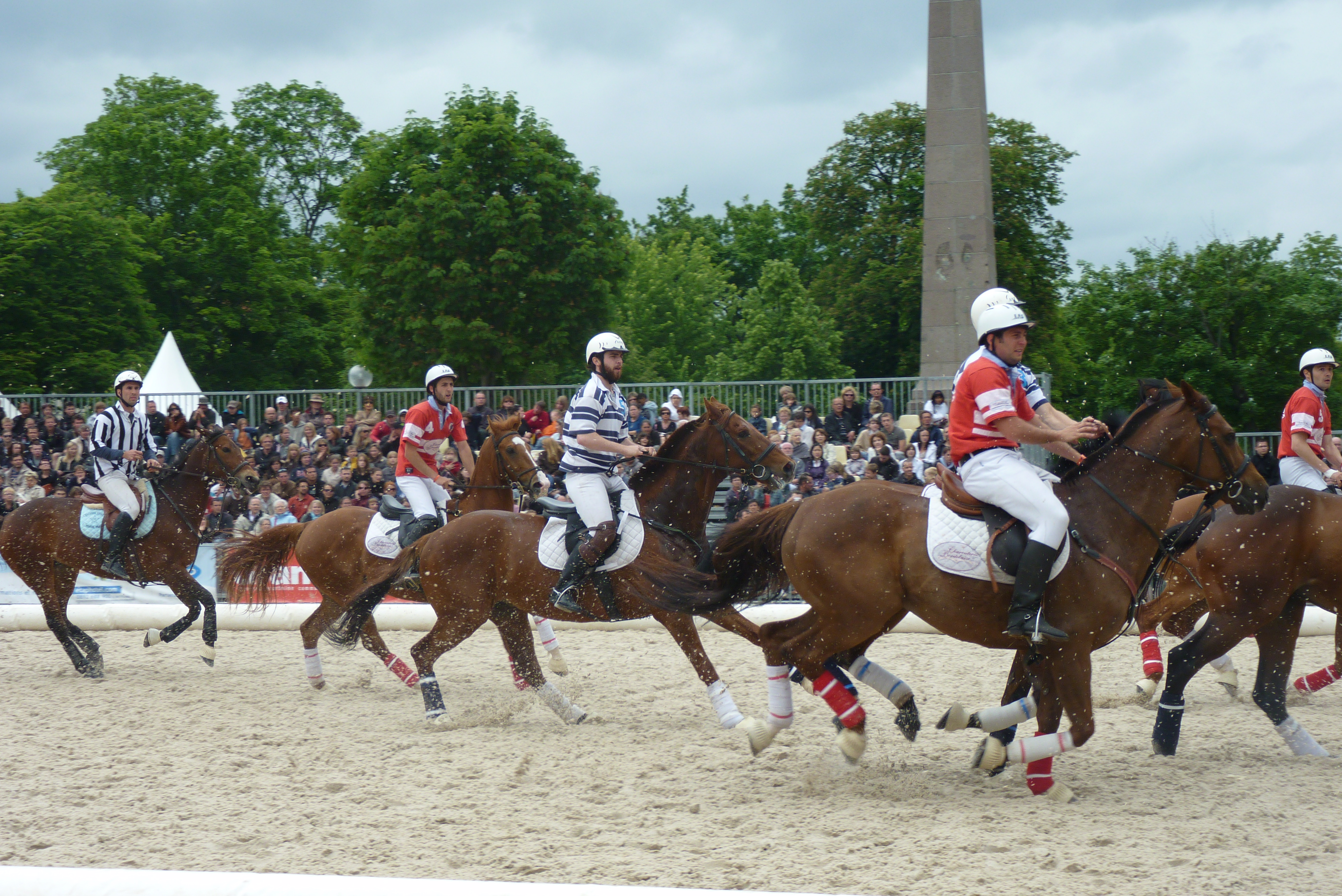 Finale du championnat de France de Horseball 2010 à Nancy (France).